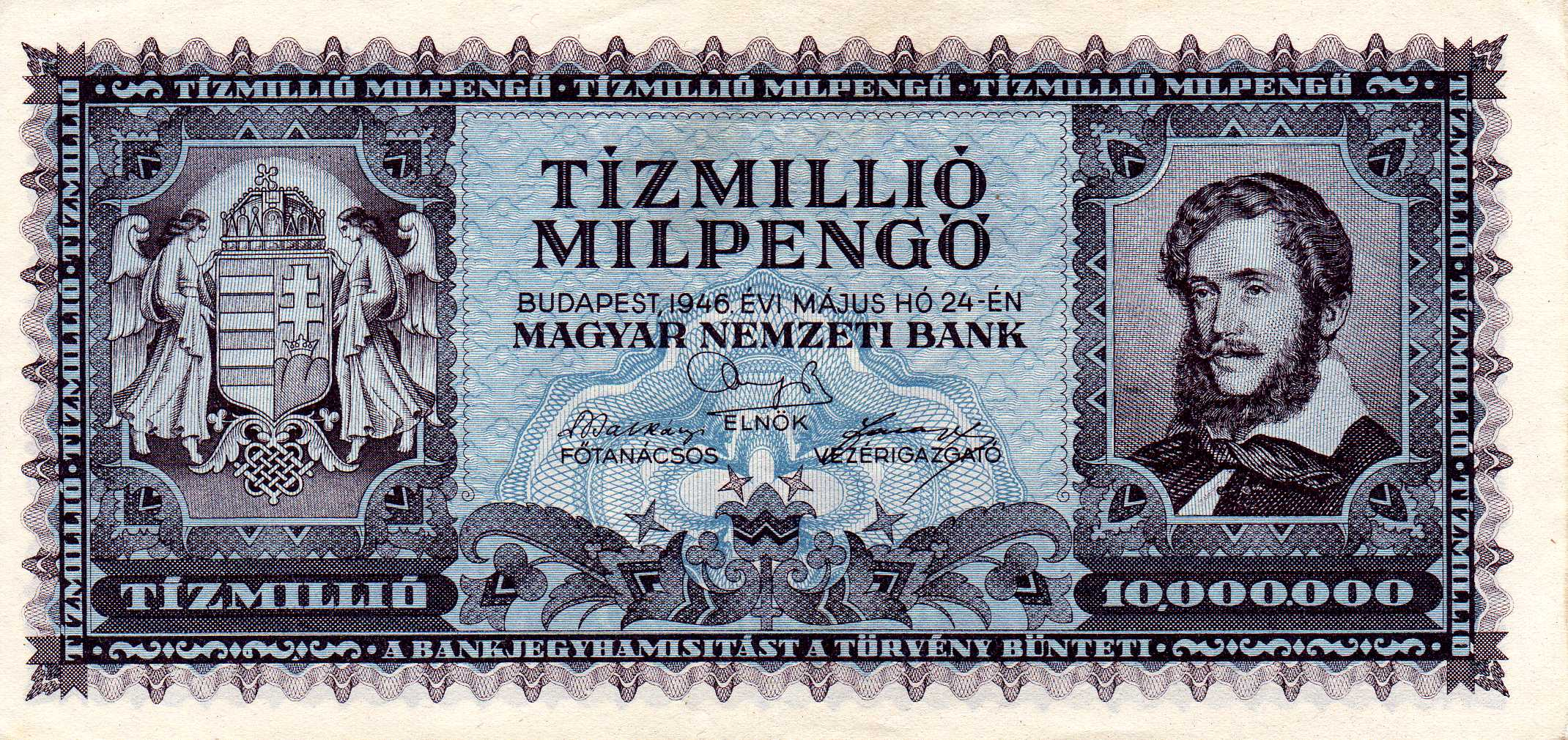 HUP 10.000.000 Mio. - obverse 1946